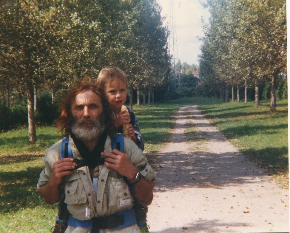 GR wandelen in de Pyreneeën.